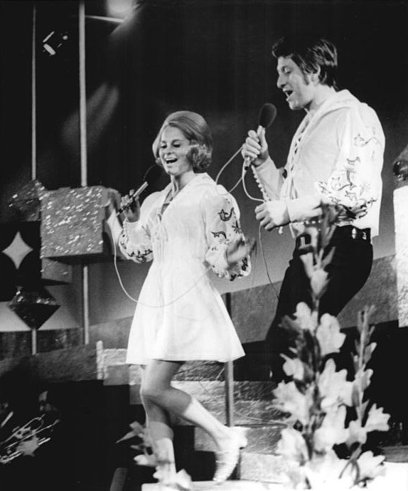 Magdeburg, Dagmar Frederic, Siegfried Uhlenbrock Zentralbild Ritter 12-11-70 Magdeburg: 5. Schlagerwettbewerb der DDR- Zum besten Titel des Wettbewerbs erklärten Jury und Publikum den Schlager "Unsere Sommerreise" von G. Natschinski-Hardt. Die Interpreten Dagmar Frederic und Siegfried Uhlenbrock konnten bei diesem Ausscheid auch den Preis des Publikums für die besten Schlagersänger entgegennehmen. Abgebildete Personen: Frederic, Dagmar: Schlagersängerin, DDR (PND 119269511) Uhlenbrock, Siegfried: Schlagersänger, DDR (PND 13454398X)